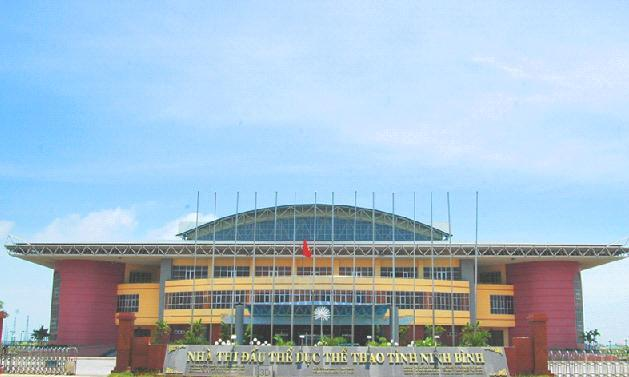 Nhà thi đấu thể thao Ninh Bình - Công trình phục vụ seagame 2003 tại trung tâm thành phố Ninh Bình tỉnh Ninh Bình.